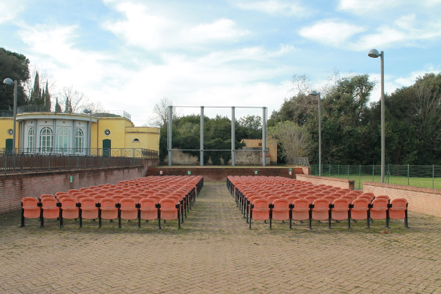 Foto dell'Arena Cinema di Villa Carmignani, foto scattata con il permesso del Comune di Collesalvetti e dei residenti della Villa